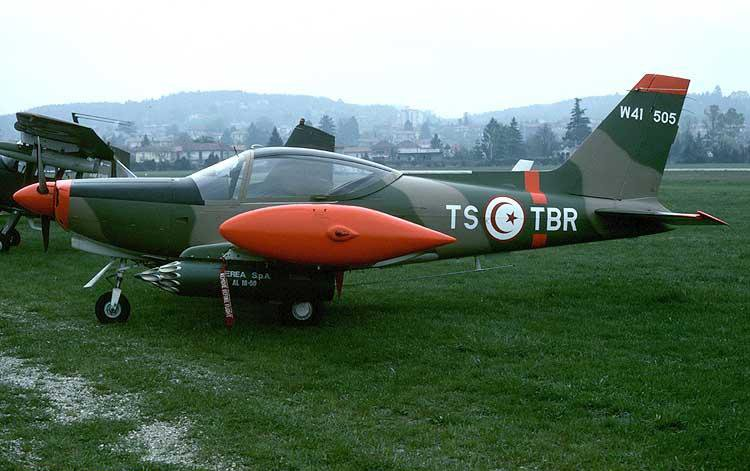 Avion d'entrainement de l'armée de l'air Tunisienne SIAI-Marchetti SF.260